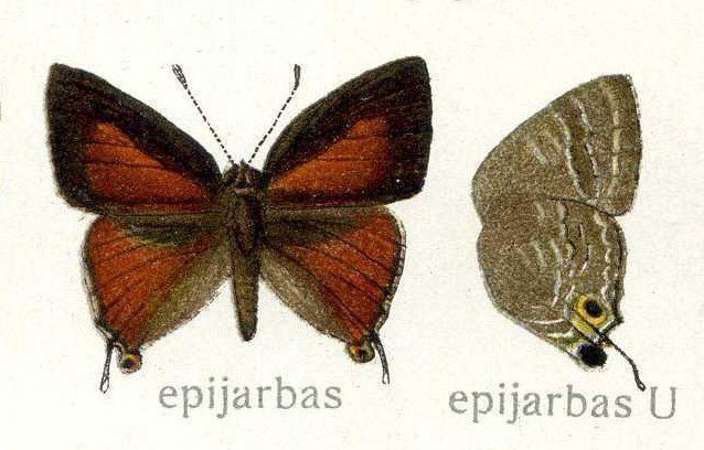 Deudorix epijarbas, Lycaenidae